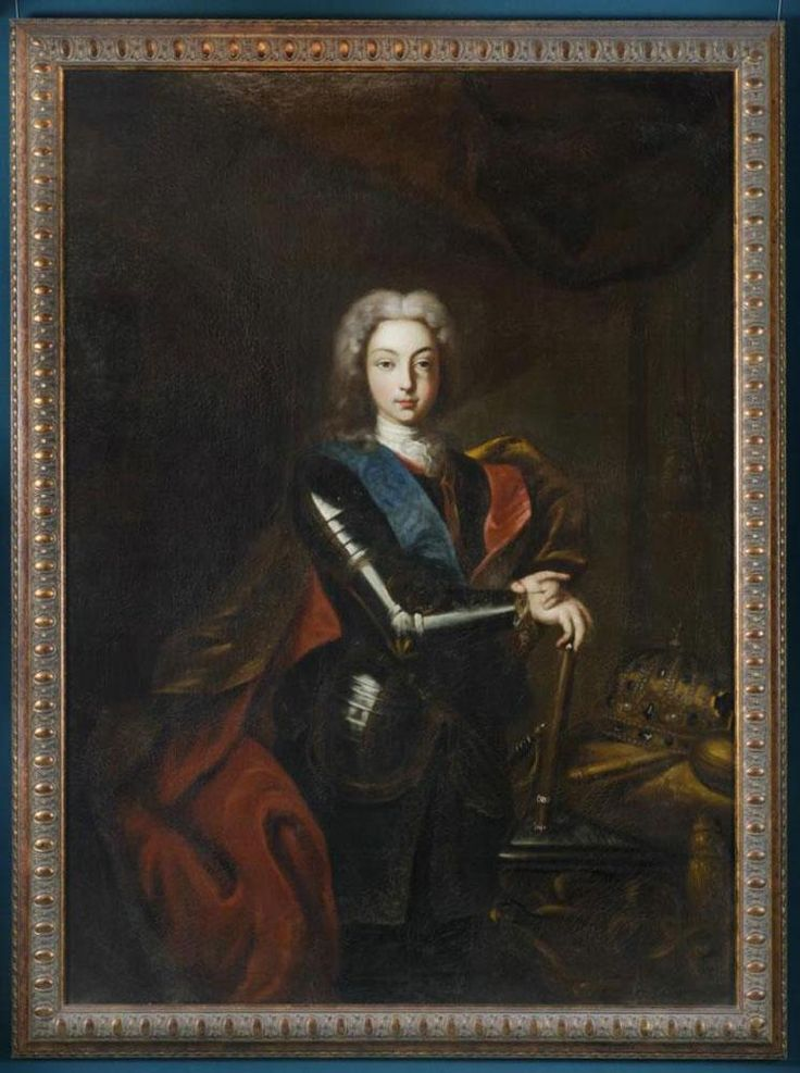 Ritratto di Pietro II di Russia Портрет императора Петра II с оригинала И.П.Люддена Россия, 1728-1744 гг. Неизвестный художник. Холст, масло. Император Петр II представлен на гладком светло-коричневом фоне по пояс. Торс изображен в небольшом повороте вправо, голова - в фас. На голове Петра пудренный парик, букли которого спускаются вдоль щек. Петр одет в расстегнутый на груди серебристо-серый кафтан с пуговицами по левому борту. Под кафтаном сорочка бело-серого цвета. Поверх кафтана - горностаевая мантия, скрепленная под шеей перевязью с драгоценными камнями. На груди цепь и крест ордена св.Андрея Первозванного. Портрет входит в состав первой династической серии, которая располагалась в залах Оружейной палаты, восстановленных после нашествия 1812 года. Инициатором ее создания и автором программы был Н.Б. Юсупов, который поручил выполнение своим крепостным художникам.